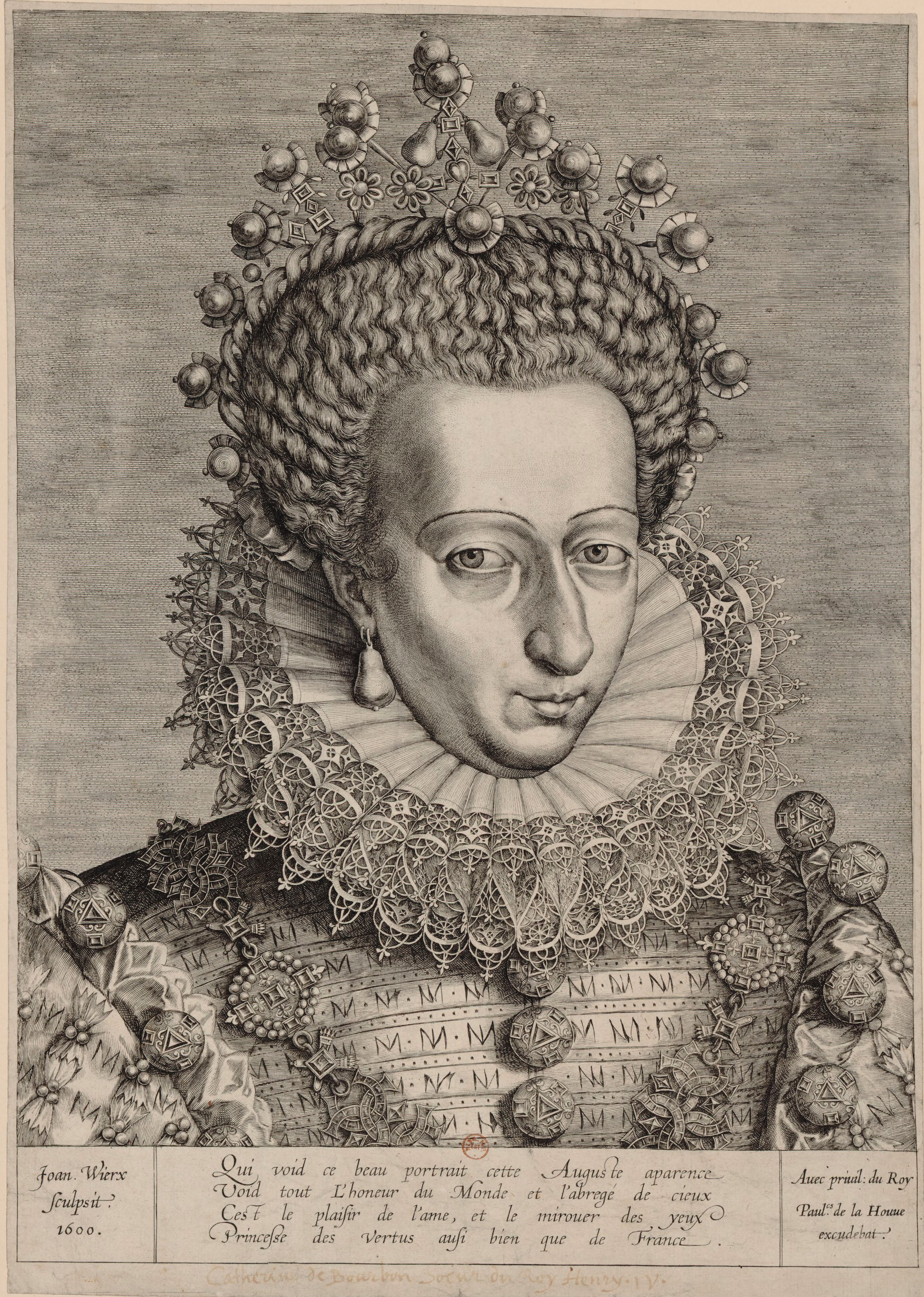 Catherine de Bourbon, sœur d'Henri IV. Gravure de Joan Wierx, Bibliothèque nationale de France, département des estampes et de la photographie, RESERVE QB-201 (13)-FOL.